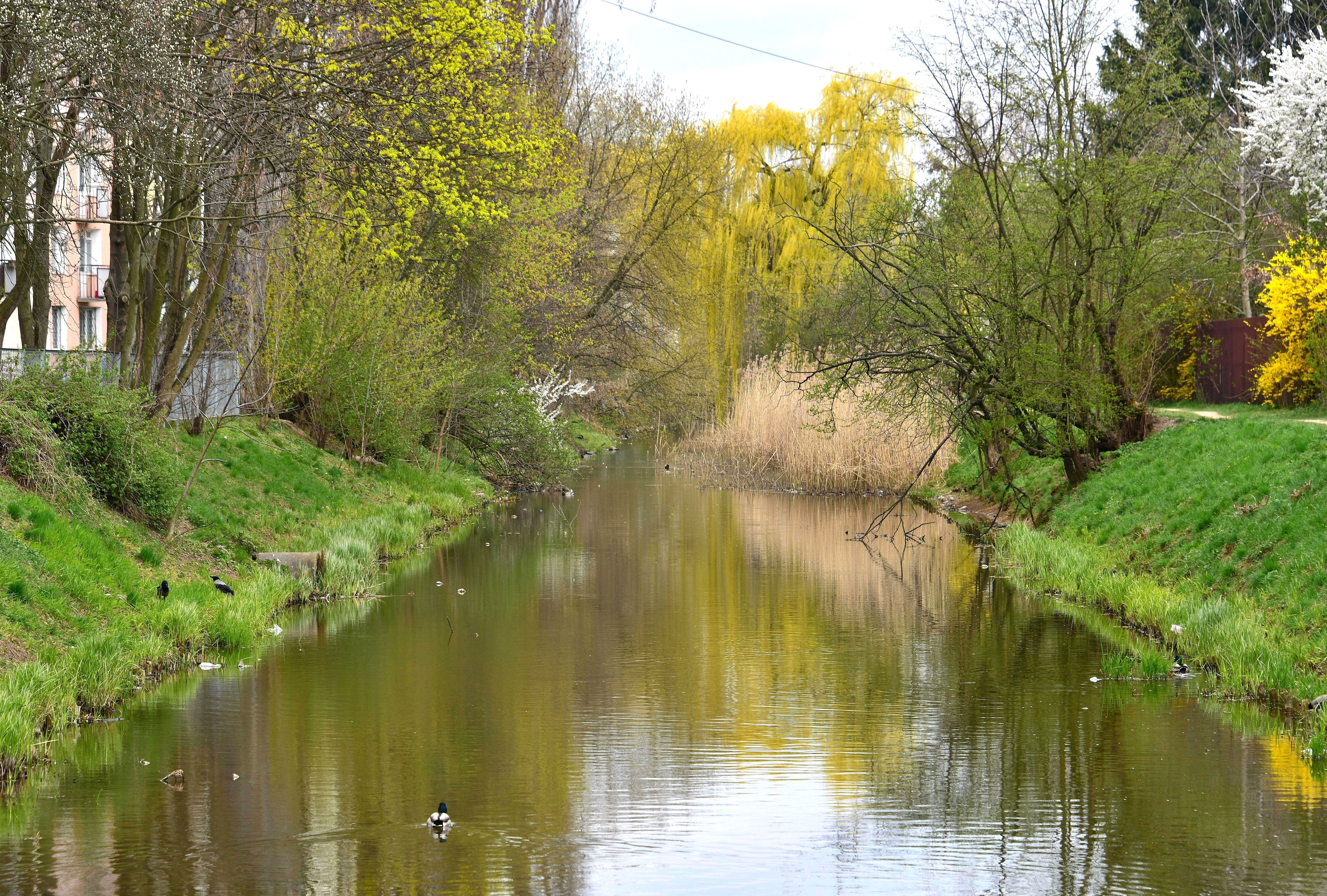 Kanał Wystawowy w rejonie ul. Abrahama